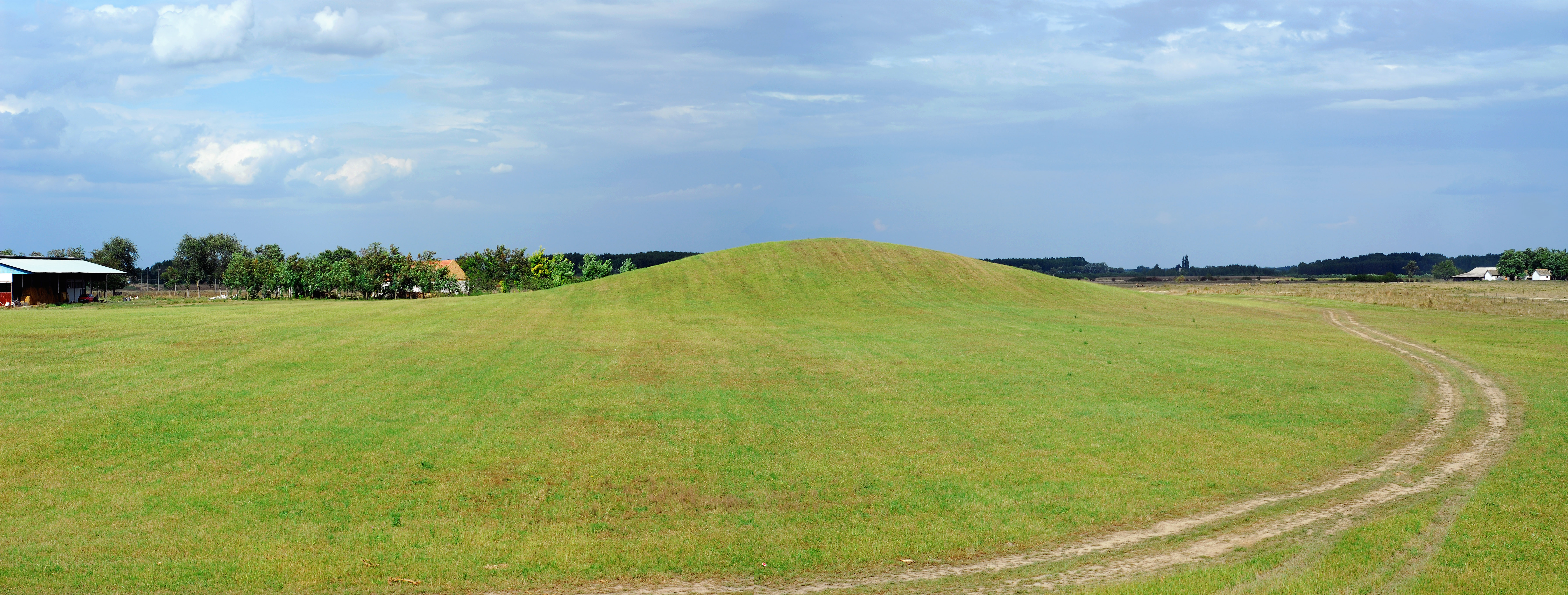 Srpski (latinica): Veličanstven pogled na humku "Stari Žabalj" BAC805